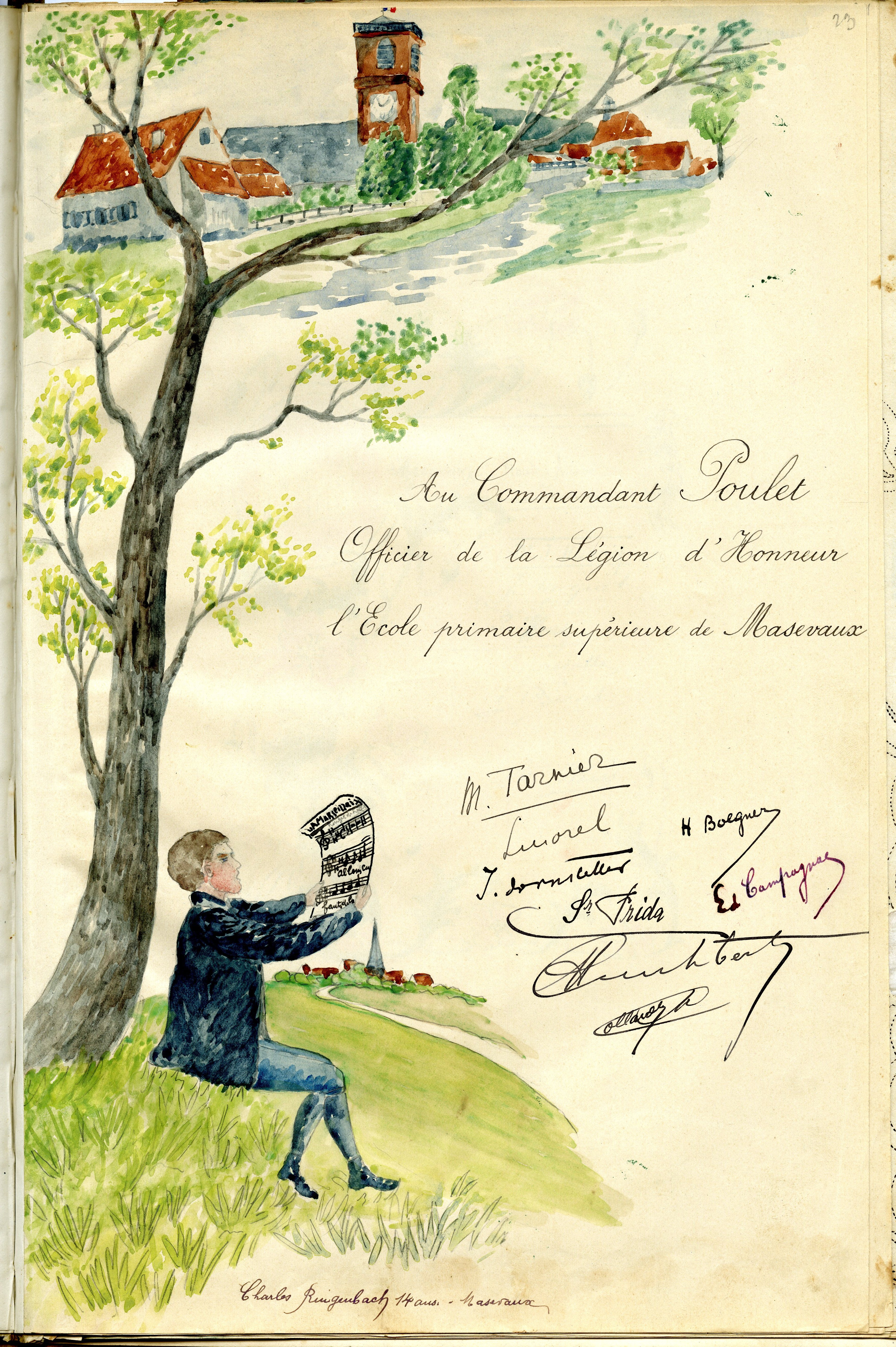 Dans les dernières années du conflit, les zones reprises progressivement aux Allemands - en général du fait d'un paysage géographiquement compartimenté, une dizaine ou une vingtaine de villages... - étaient placées sous une sorte de protectorat militaire français pour éviter désordres et exactions. C'est ainsi que les territoires de Thann, Masevaux et Saint-Amarin furent confiés à un administrateur autochtone, originaire de Thiaucourt, (Jean)-Henry Poulet, né le 16 février 1874 d'une famille de magistrats, et ayant déjà exercé plusieurs hautes fonctions politiques de 1899 à 1913. Mobilisé en 1914, le Capitaine puis Commandant Poulet fut désigné Administrateur, Chef de Mission Militaire Administrative de ce petit coin d'Alsace libéré. Il accomplit cette charge avec beaucoup de générosité et d'humanité : il s'attira ainsi l'affection et la gratitude des habitants.